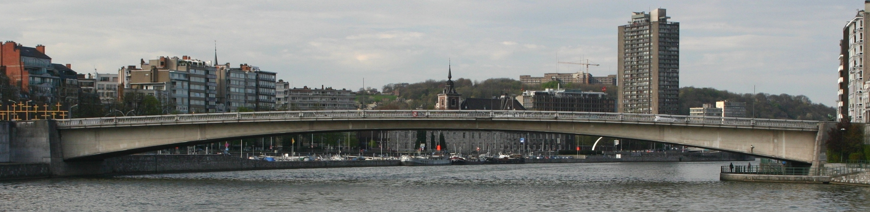 Pont Albert 1er zu Léck vu flossop gesinn. Kategorie:Brécken an der Belsch